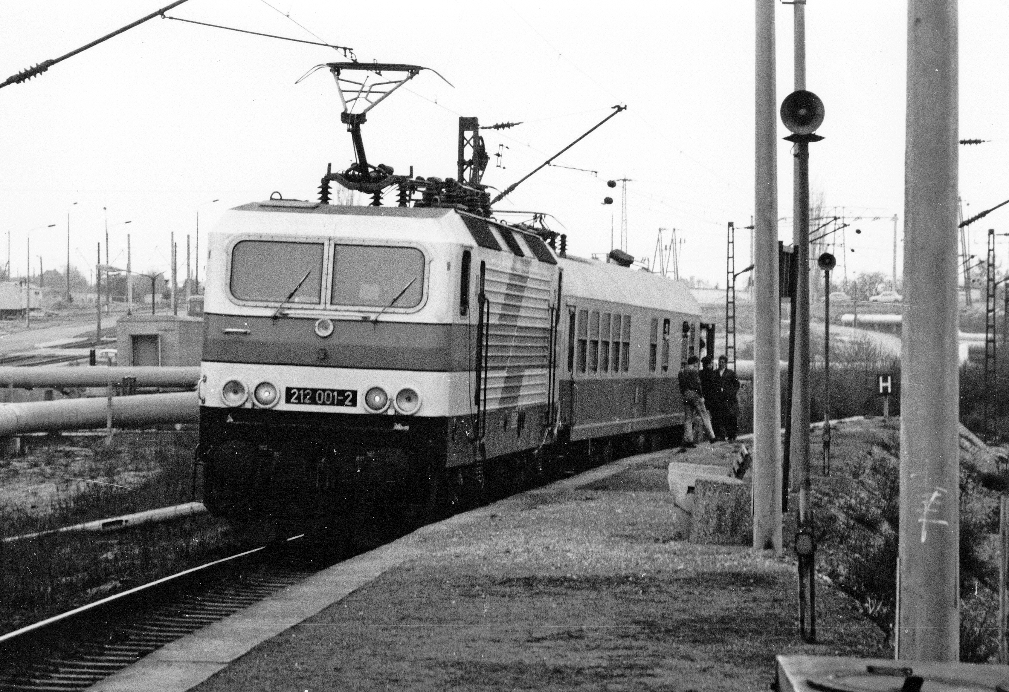 Elok Deutsche Reichsbahn 212 001-2 "weiße Lady" bei einem Zwischenstopp mit ZIFV Messwagen während Erprobungsfahrten am Haltepunkt Halle-Silberhöhe, fotoscan